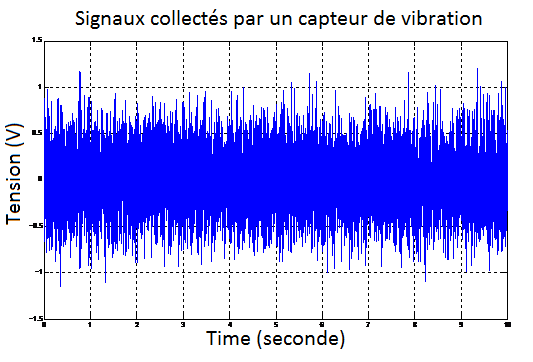 Figure créeé par l'auteur: Signaux collectés par un capteur de vibration